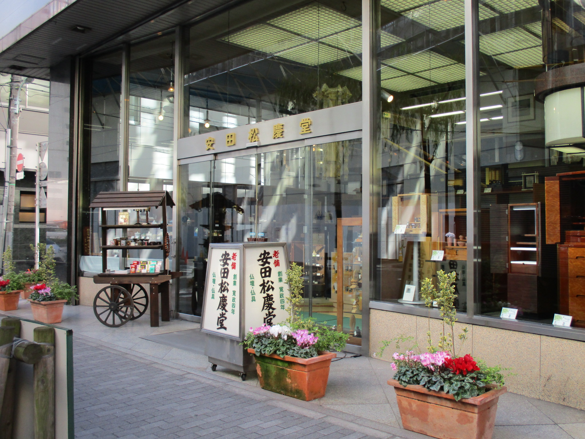 安田松慶堂銀座本店